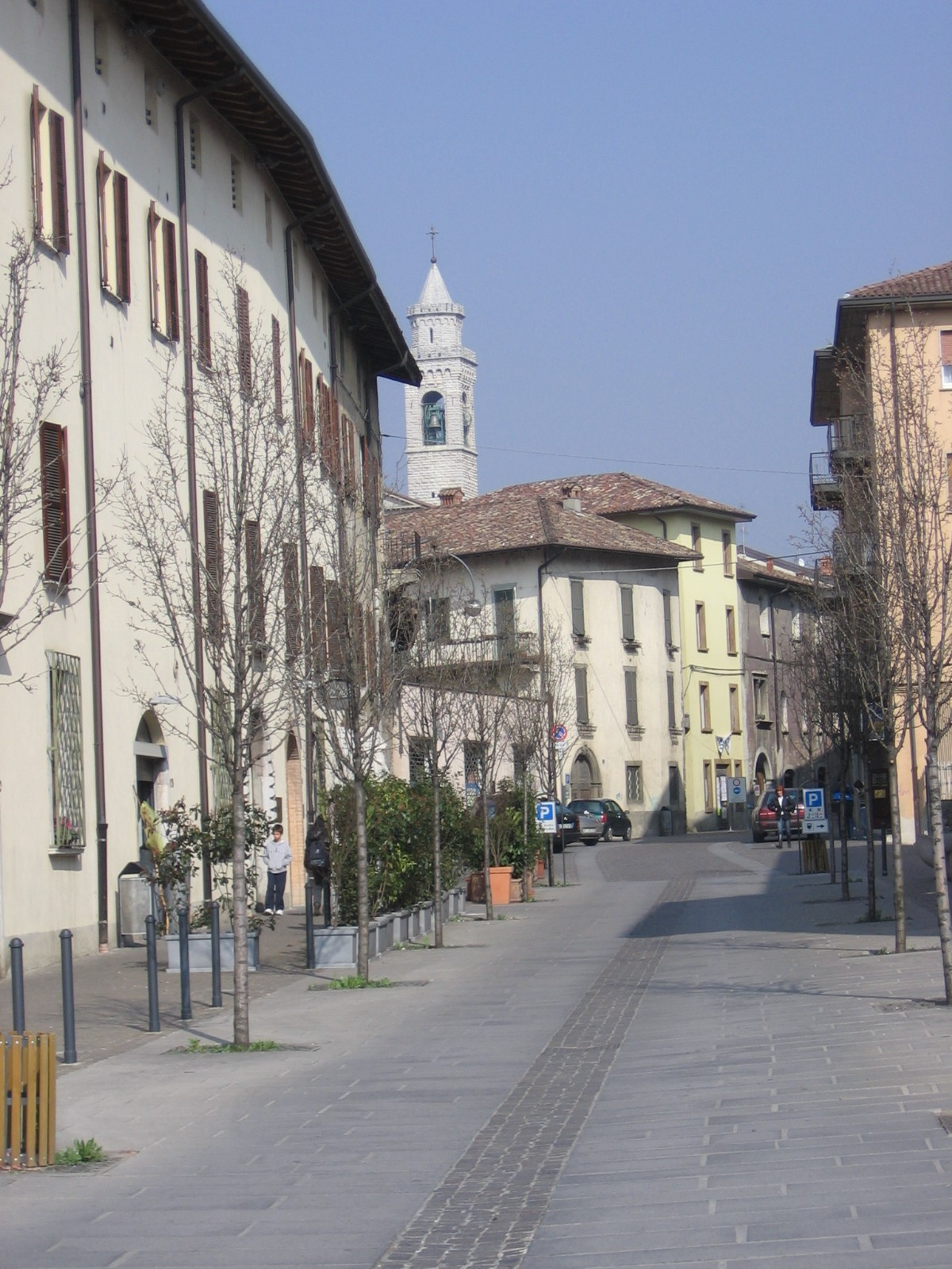 Albino, centro storico, Bergamo, Italy